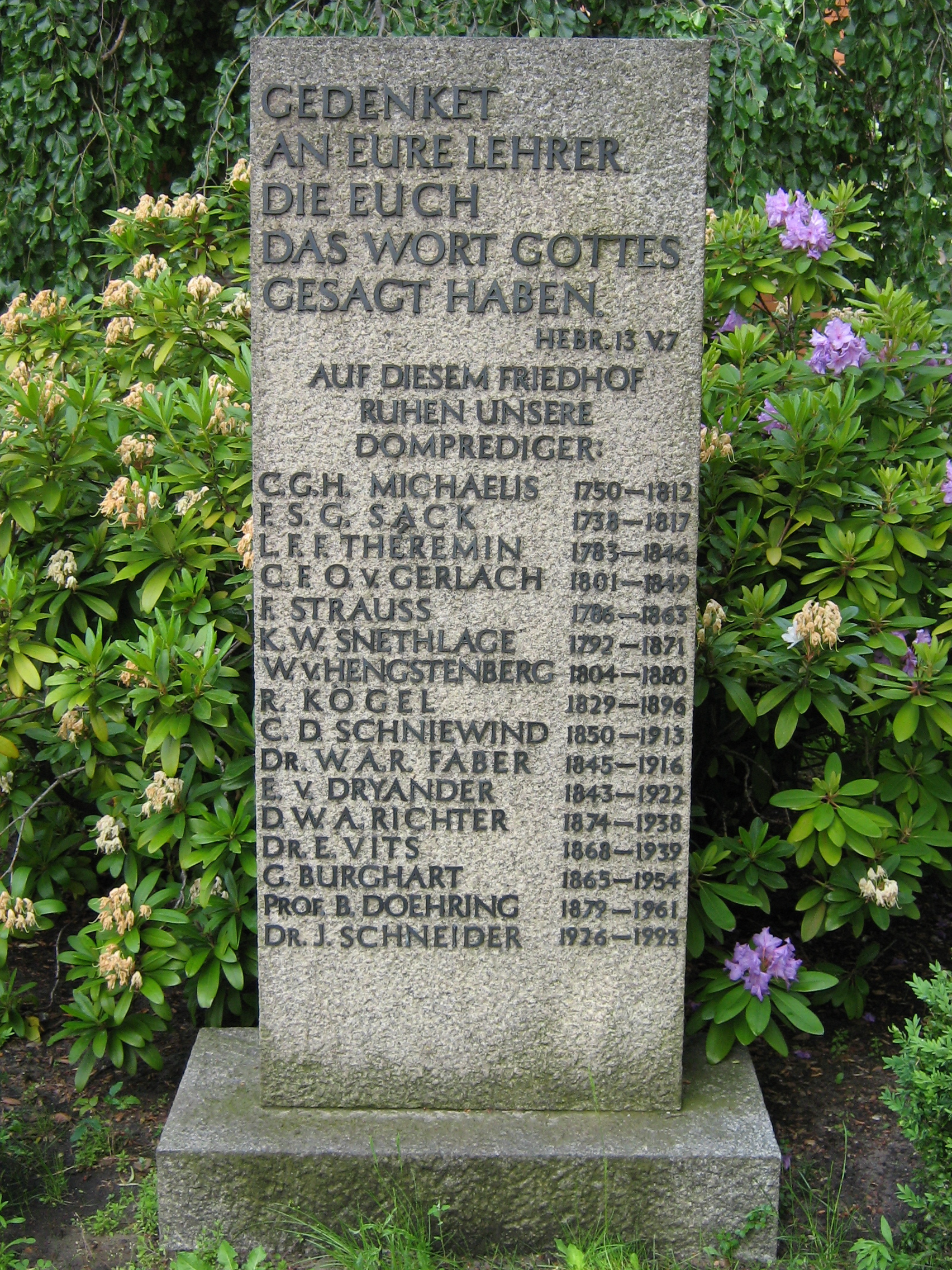 Gedenkstein Domprediger auf dem Domkirchhof Müllerstraße in Berlin